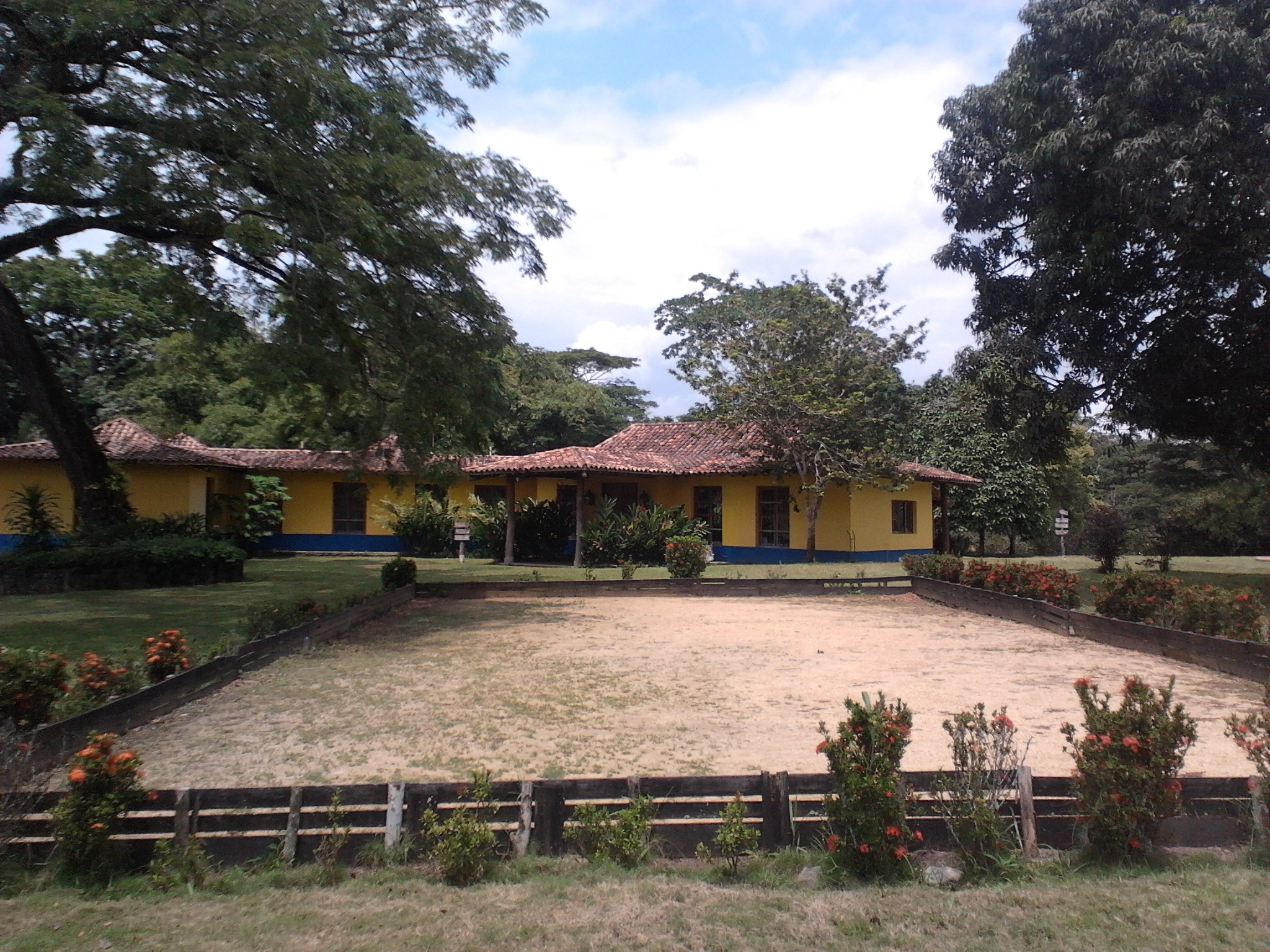 Cancha de bolas criollas, uno de los juegos folklóricos de Venezuela. Campamento Mi Refugio, Caucagua, Edo. Miranda